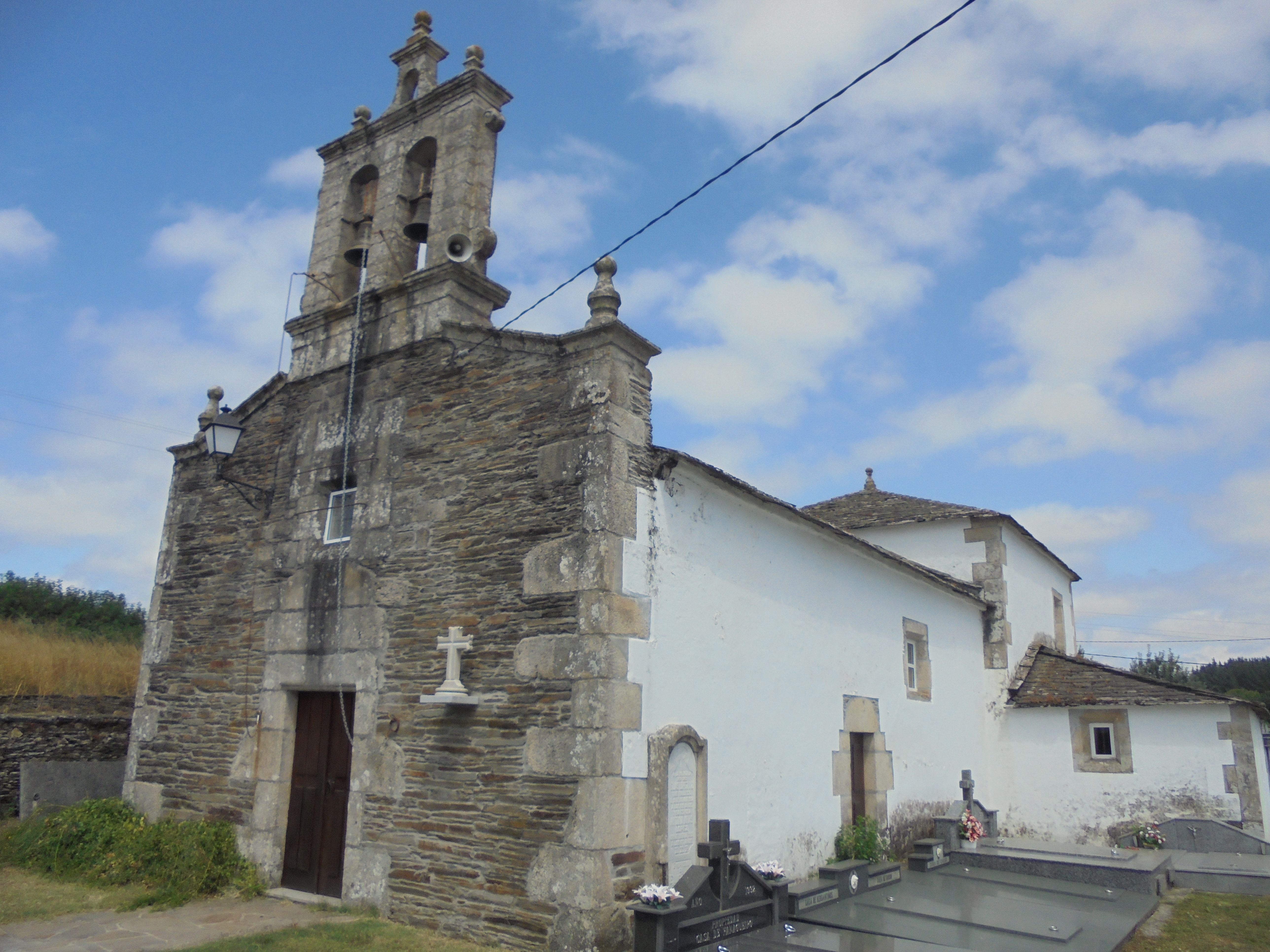 Igrexa parroquial de San Martiño de Piñeiro ( Lugo)